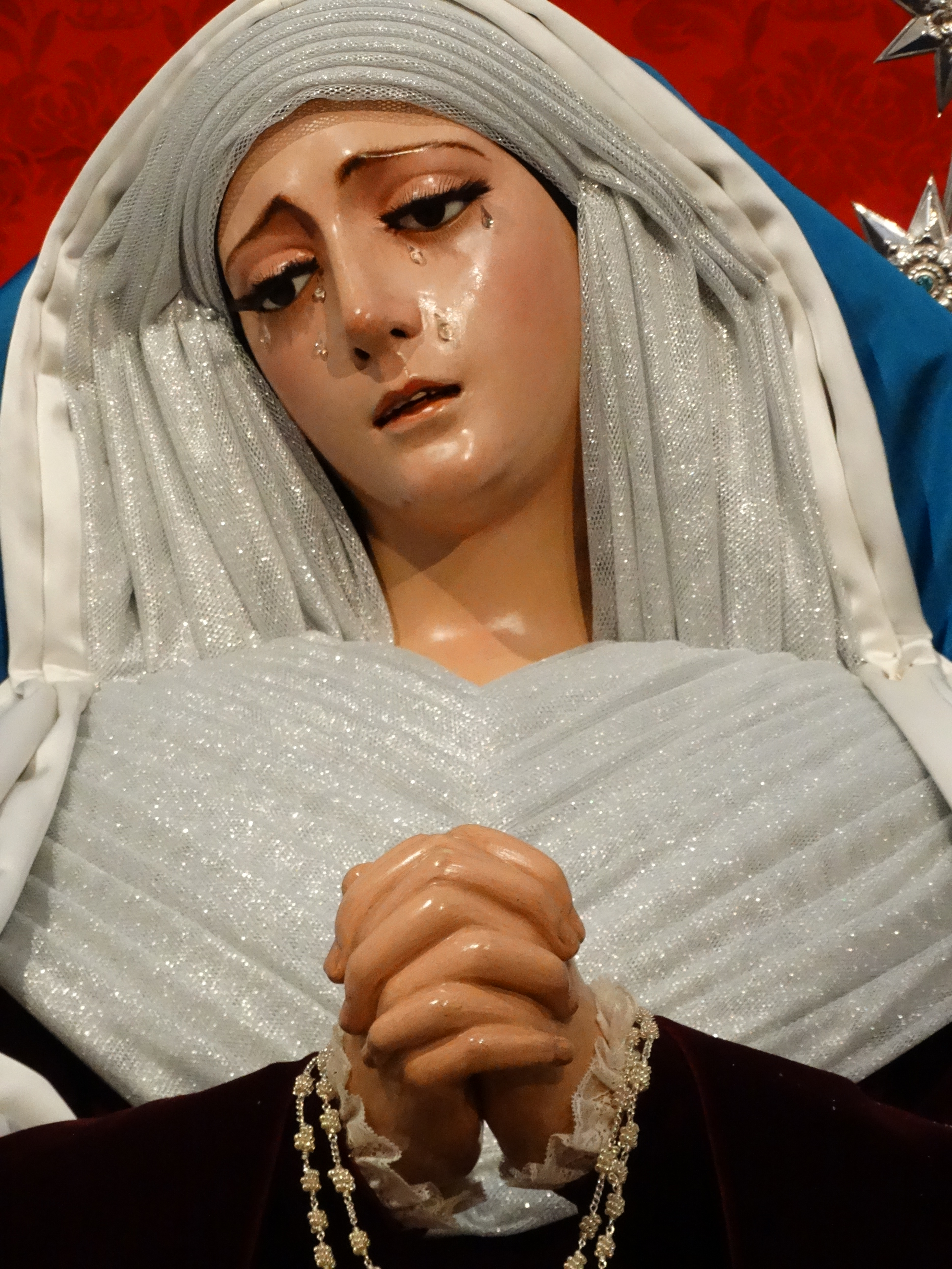 Imagen titular de la hermandad de la amargura de Carmona